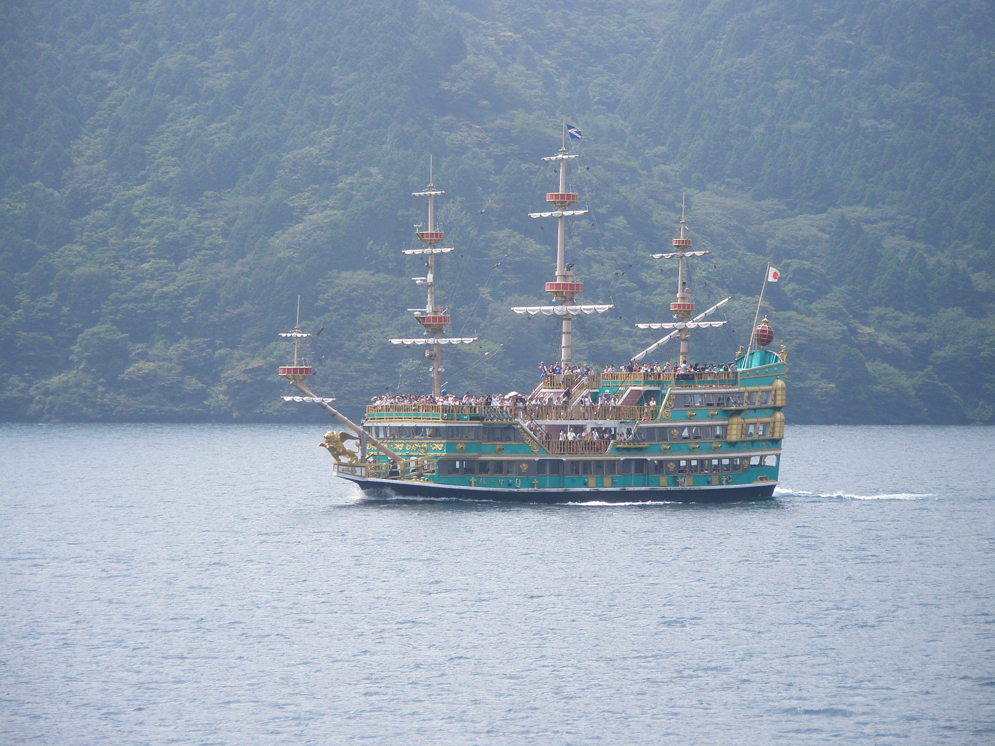 箱根海賊船バーサ号、芦ノ湖湖上にて